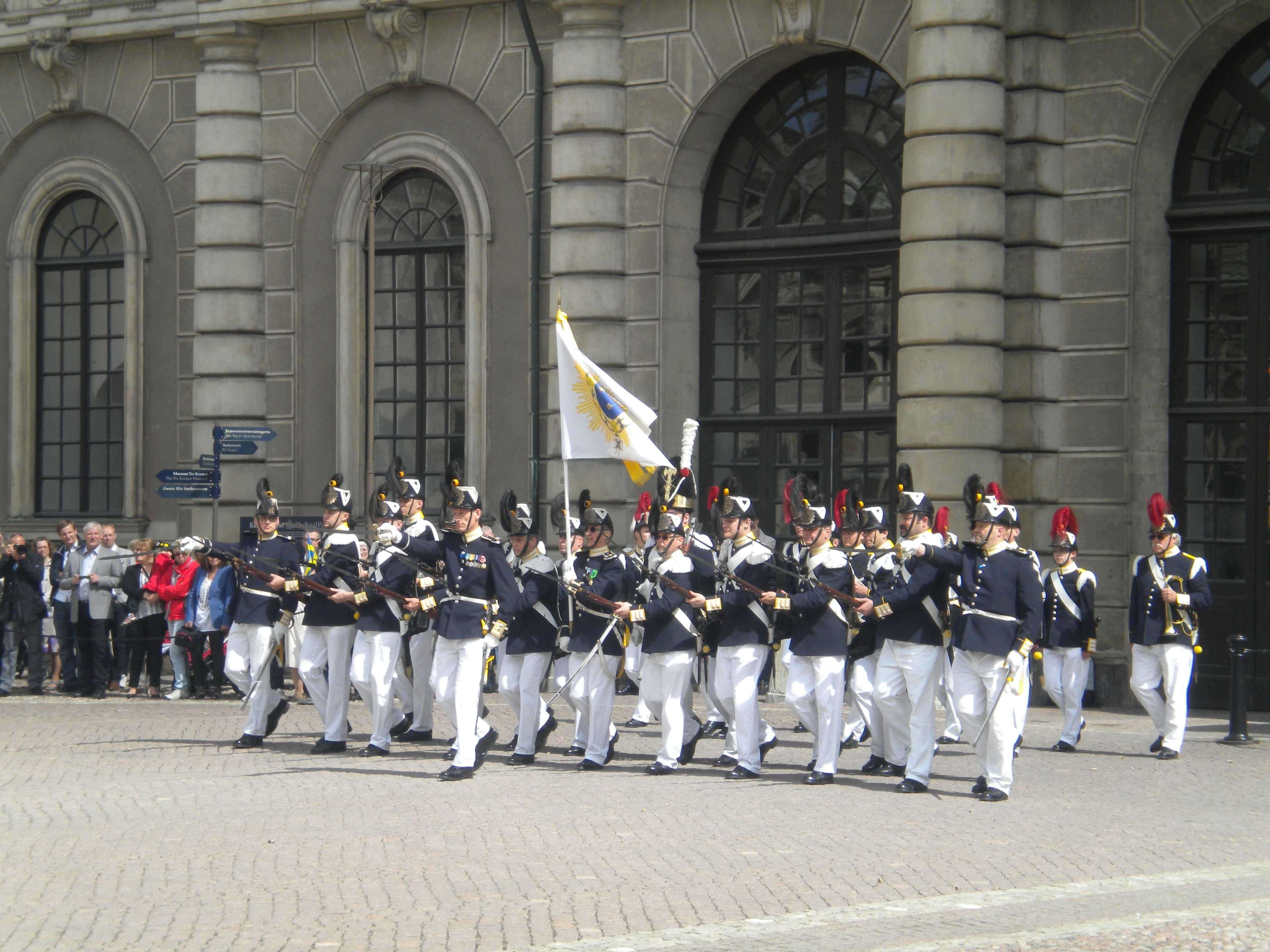 Avdelning ur Svea Livgardes Musketerarkår framträder vid det officiella nationaldagsfirandet på Yttre Borggården 2012.